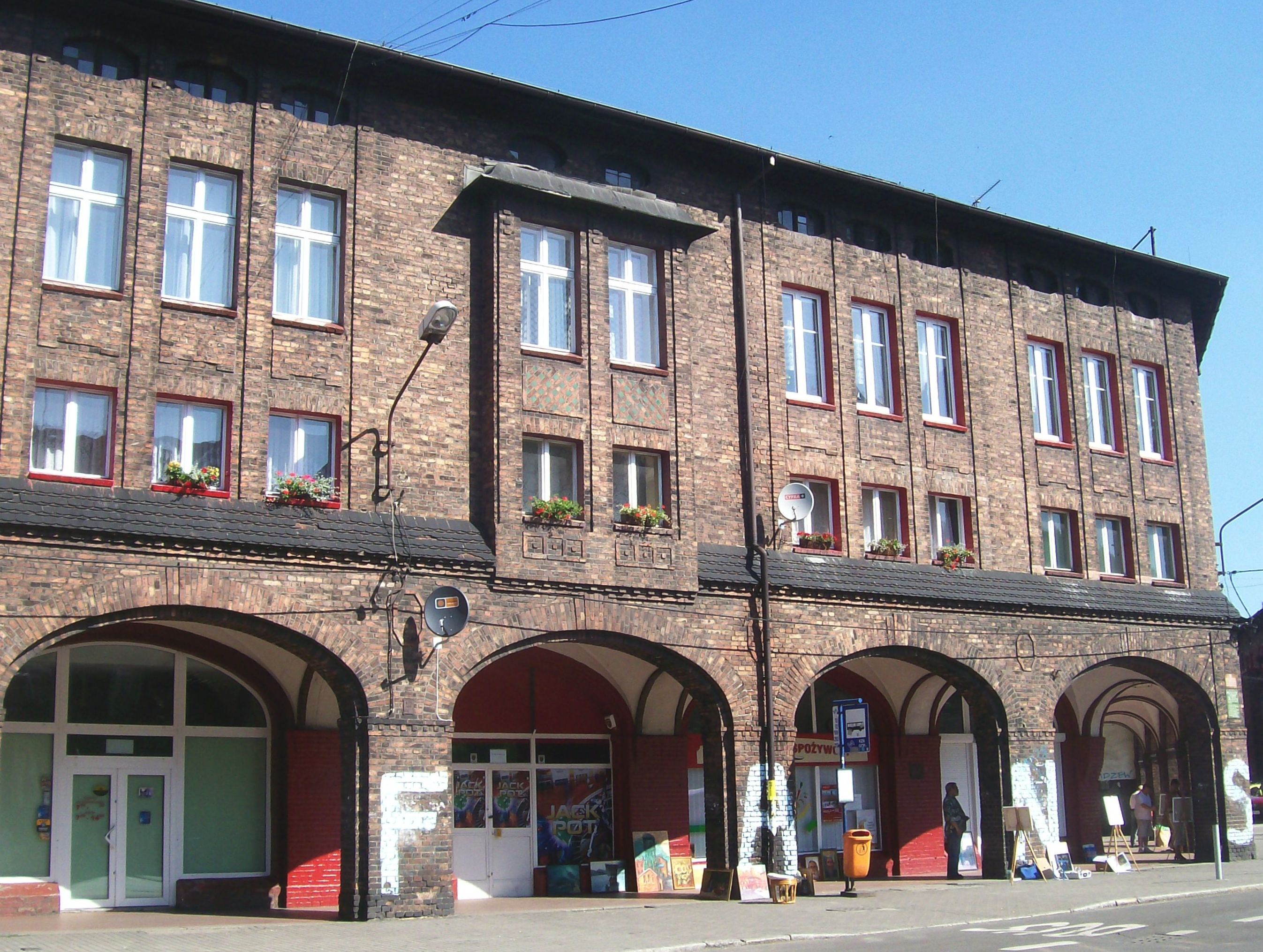 Jarmark sztuki zorganizowany w ramach I Międzynarodowego Festiwalu Sztuki Naiwnej "NIKISZ - FOR" . Janów-Nikiszowiec 27.07. 2008.